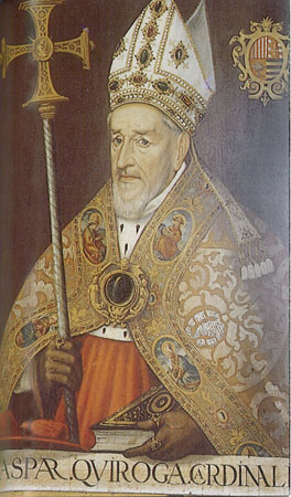 Retrato del cardenal Gaspar de Quiroga, catedral de Toledo, Sala capitular.